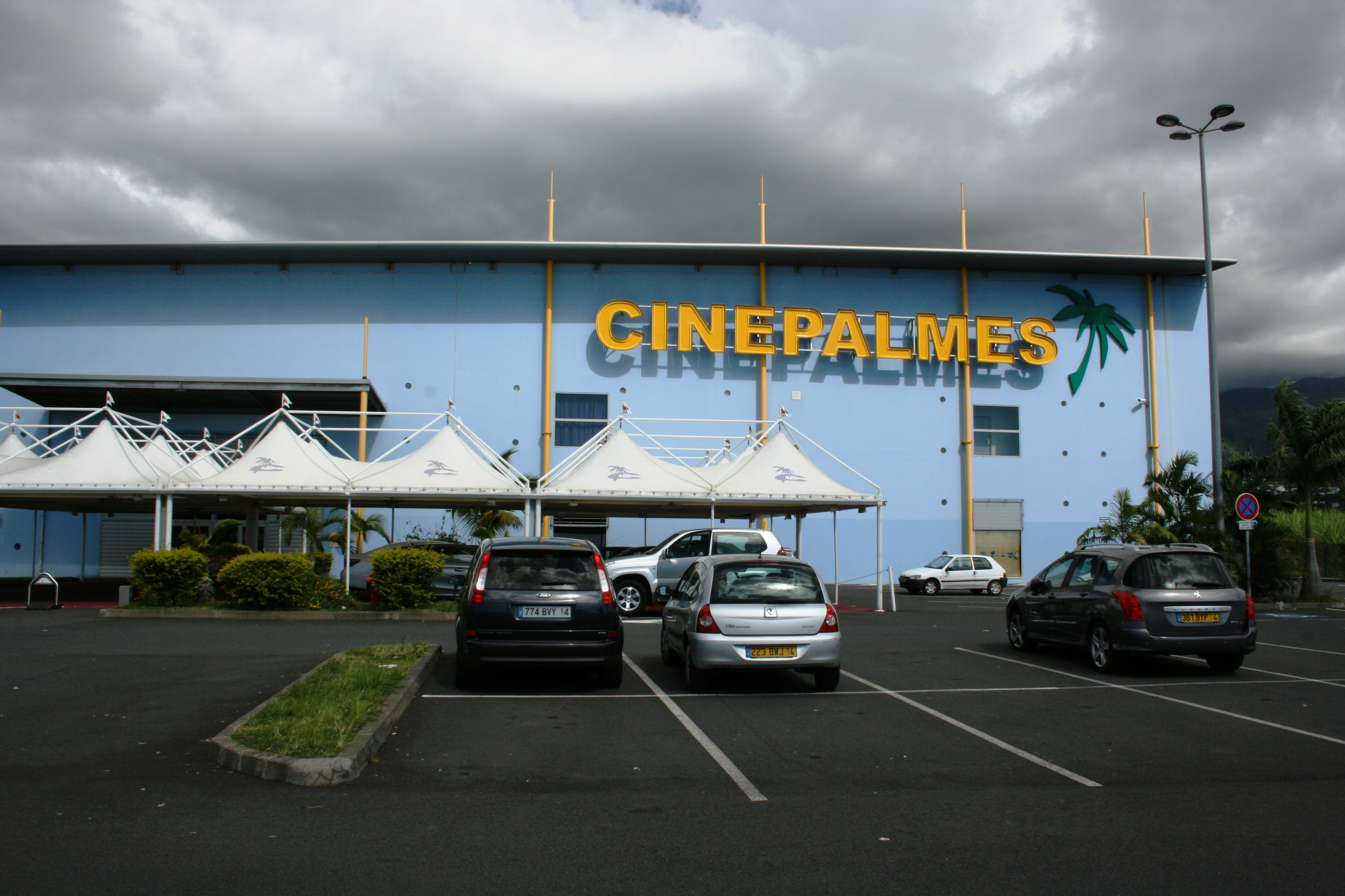 Vue du Cinépalmes à Sainte-Marie de La Réunion.